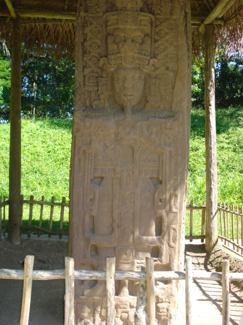 Stela C from Quiriguá, Guatemala.